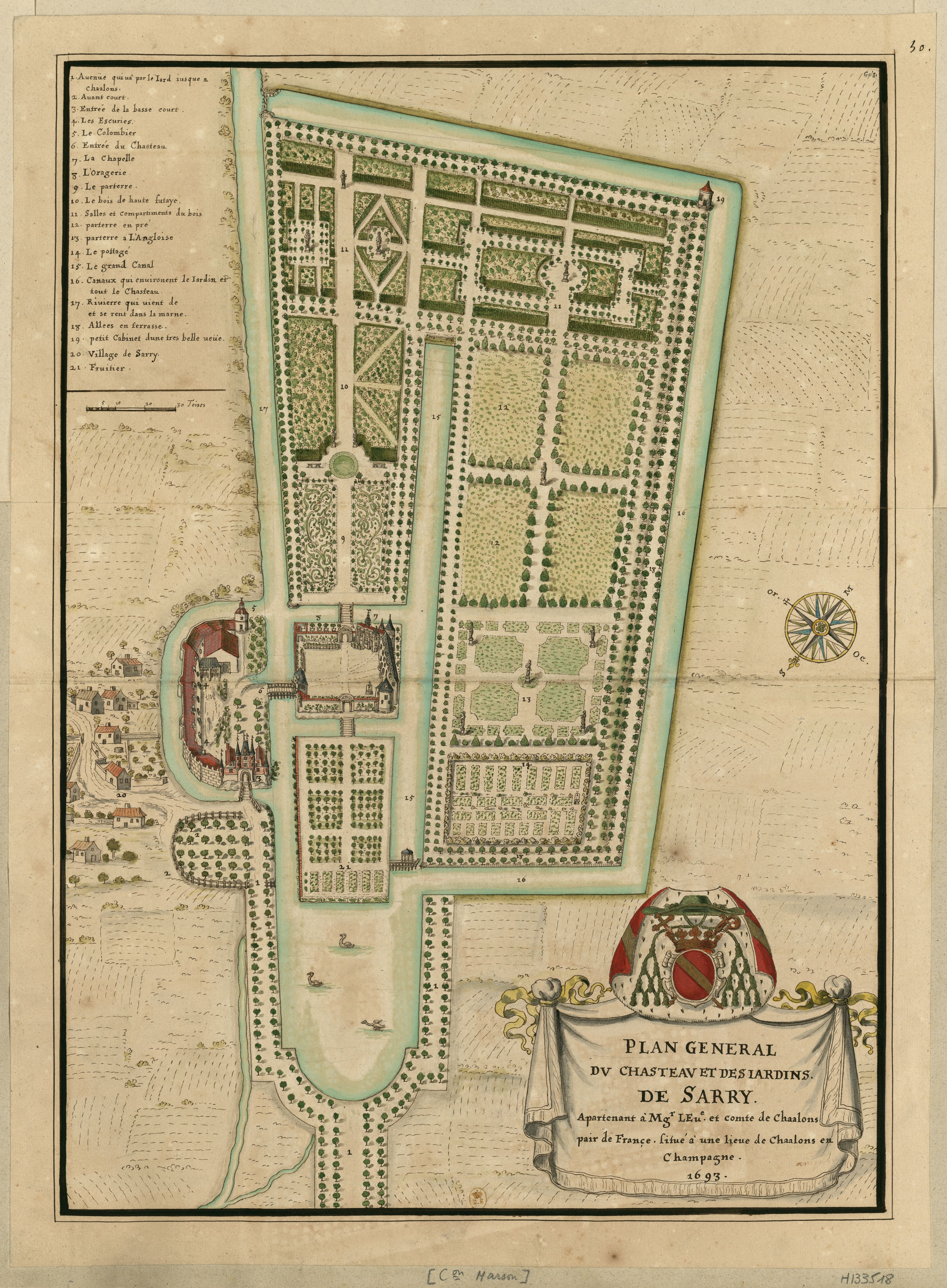 carte du Chateau de Sarry, ancien château des évêques de Châlons. Plan général du chasteau et des jardins de Sarry, apartenant à Mgr L'Ev.e et comte de Chaalons pair de France. situé à une lieue de Chaalons en Champagne // 1693 : [dessin]